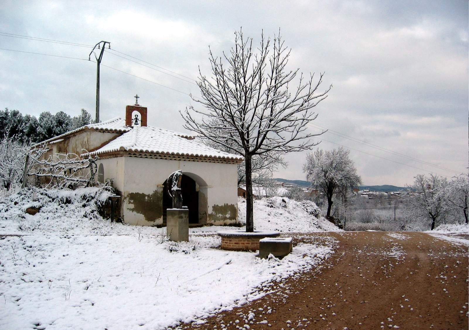 Vista frontal (oriental) de la ermita de san José, Torrebaja.